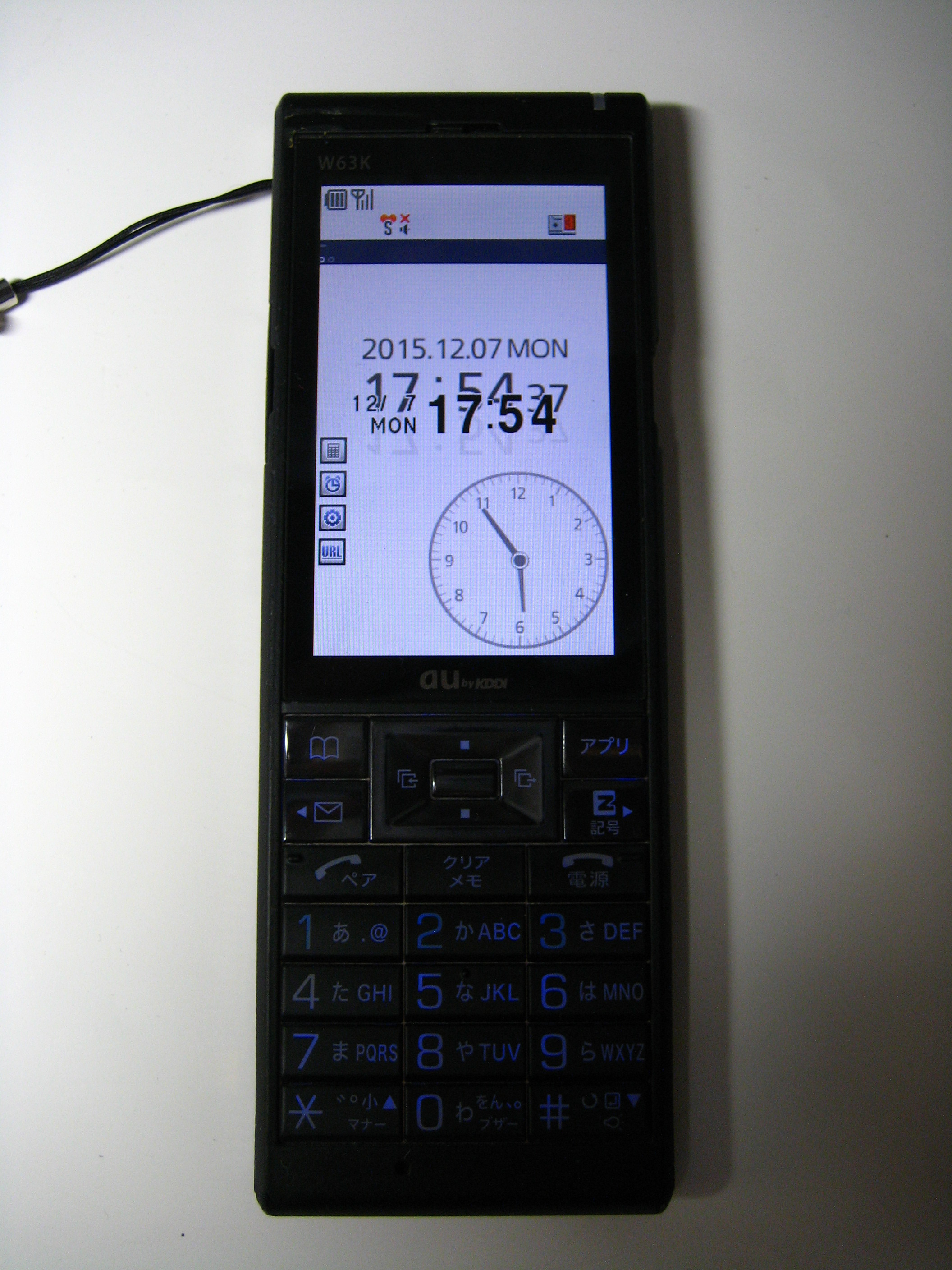 au_phone_w63k